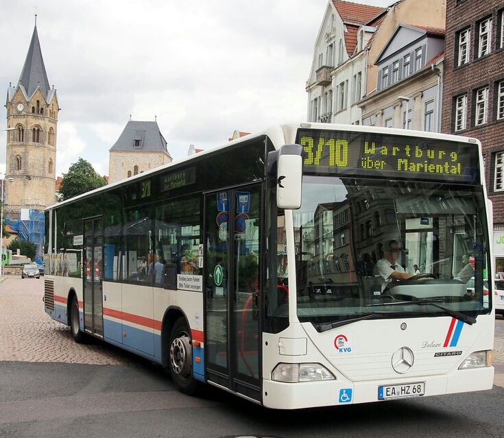 Stadtbus der KVG Eisenach auf dem Weg zur Wartburg